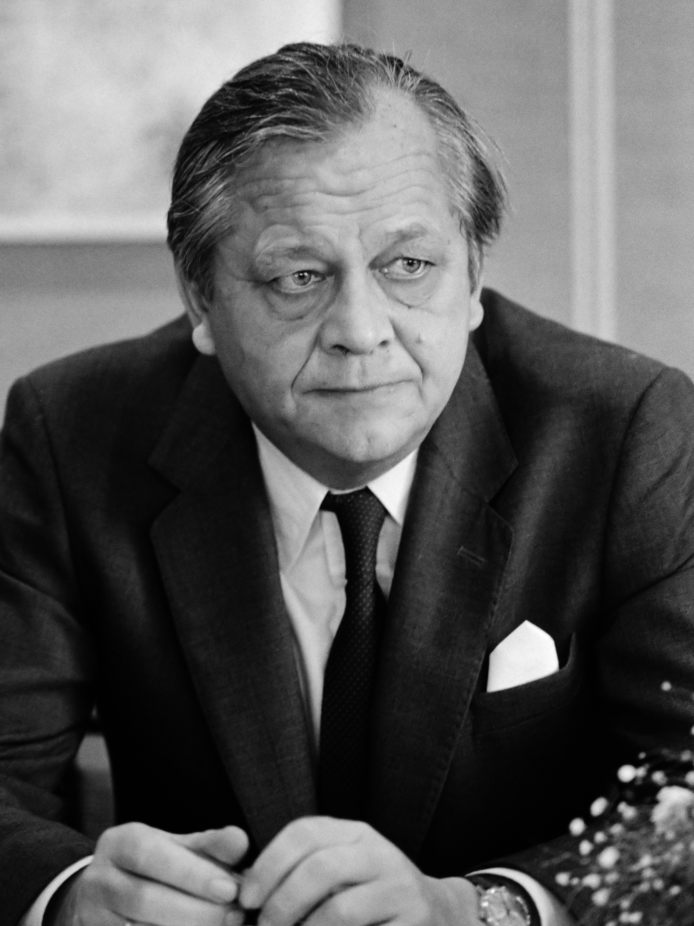 Minister van der Klaauw met zijn Noorse ambtsgenoot in Apeldoorn; de Noorse minister van Buitenlandse Zaken Knut Frydenlund 18 januari 1981